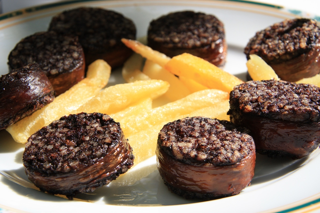 Ver artículo en mi Blog en Enlace See post in My blog at Link